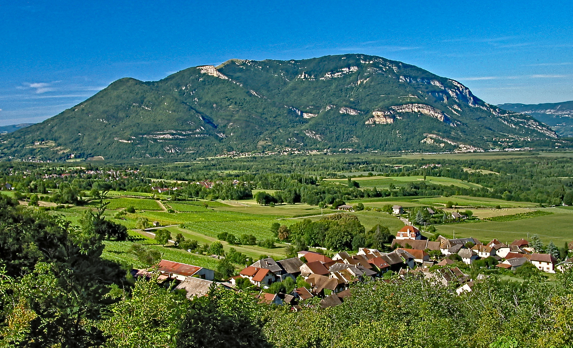 Grand Colombier, Ain, France, vu du sud ouest. Village au premier plan : Vongnes